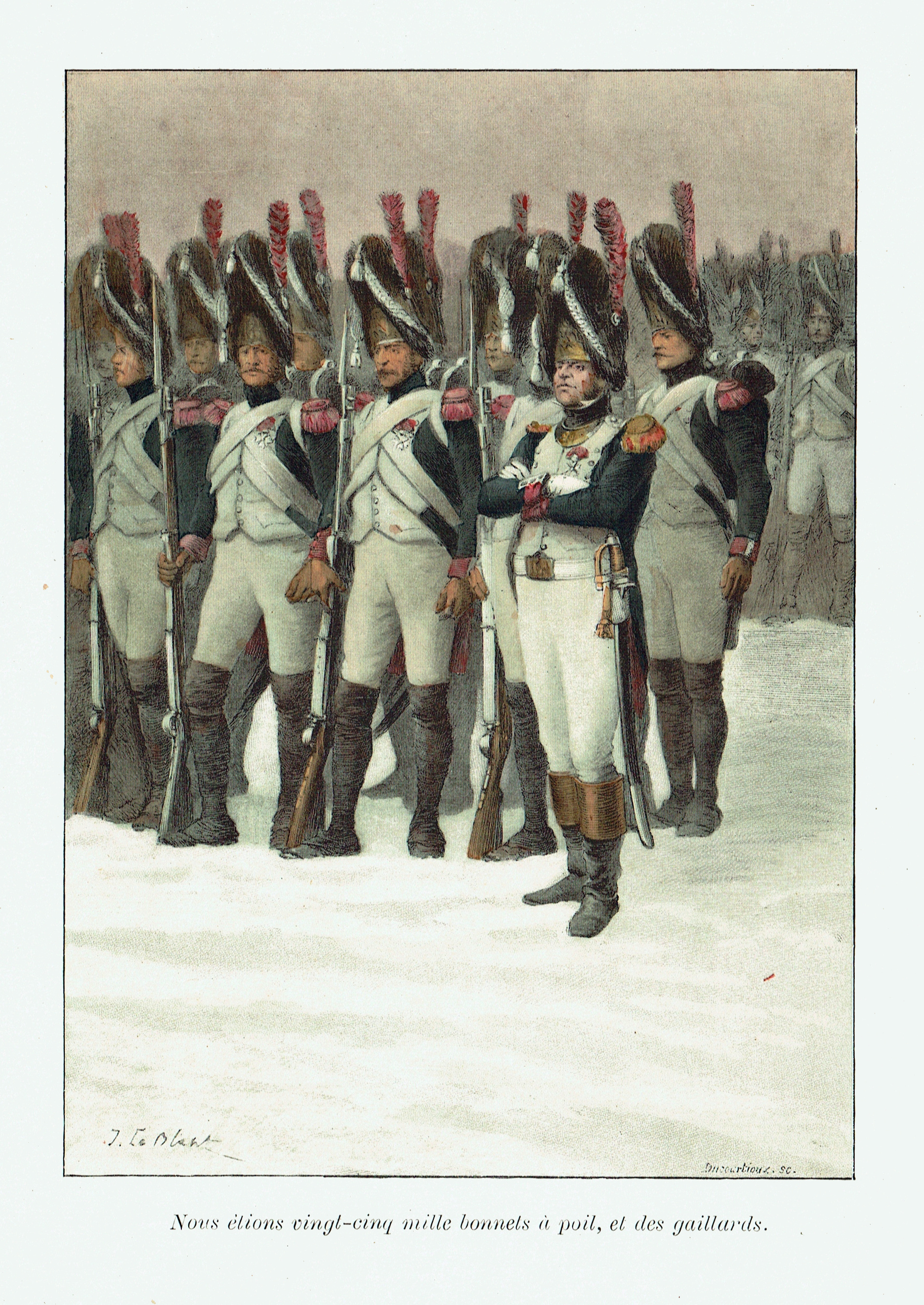 Une illustration des « cahiers du capitaine Coignet » ; par Julien Le Blant.